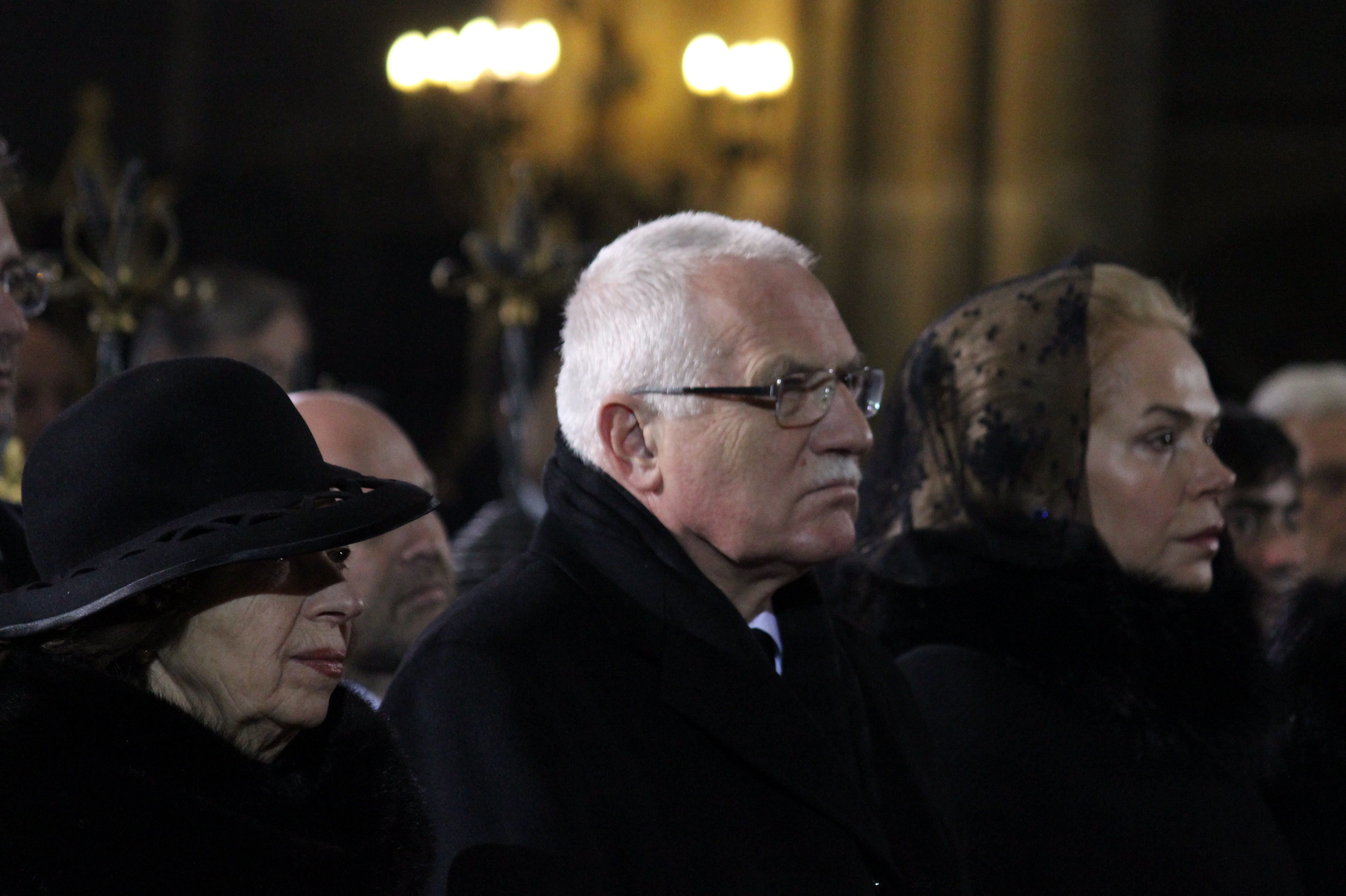 Státní pohřeb Václava Havla, posledního československého a prvního českého prezidenta, proběhl v pátek 23. prosince 2011 od 12.00 hod v katedrále svatého Víta, Václava a Vojtěcha na Pražském hradu. Zúčastnila se jej manželka Dagmar Havlová s dalšími rodinnými příslušníky, nejvyšší čeští ústavní činitelé v čele s prezidentem republiky Václavem Klausem, politici, diplomaté a řada významných hostů z České republiky i zahraničí. Na snímku zleva Livie Klausová, Václav Klaus a Dagmar Havlová.